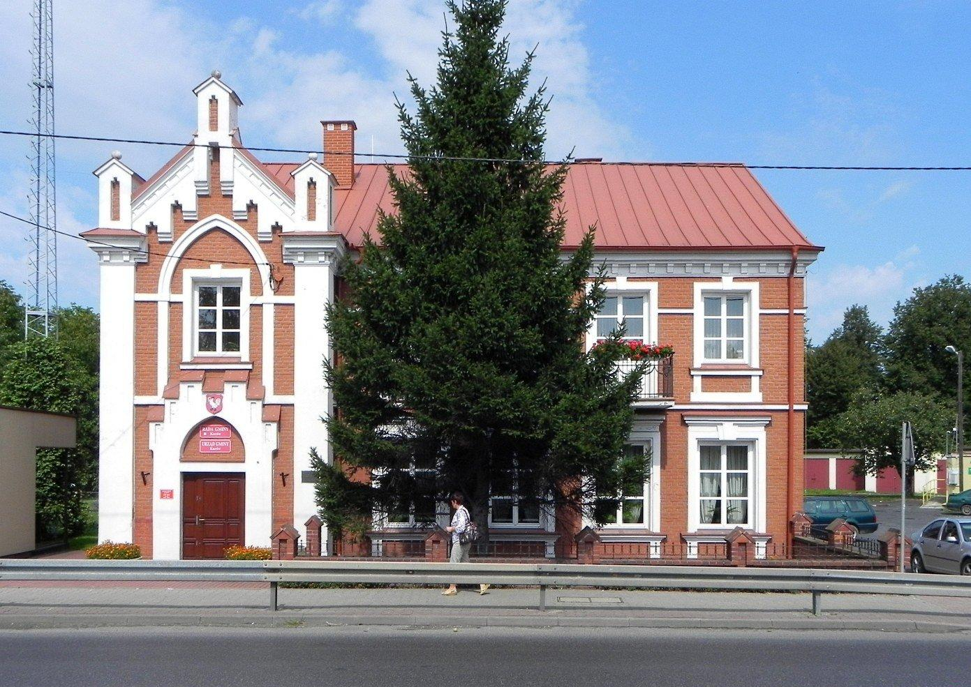 Urząd Gminy w Kurowie przy ulicy Lubelskiej 35.